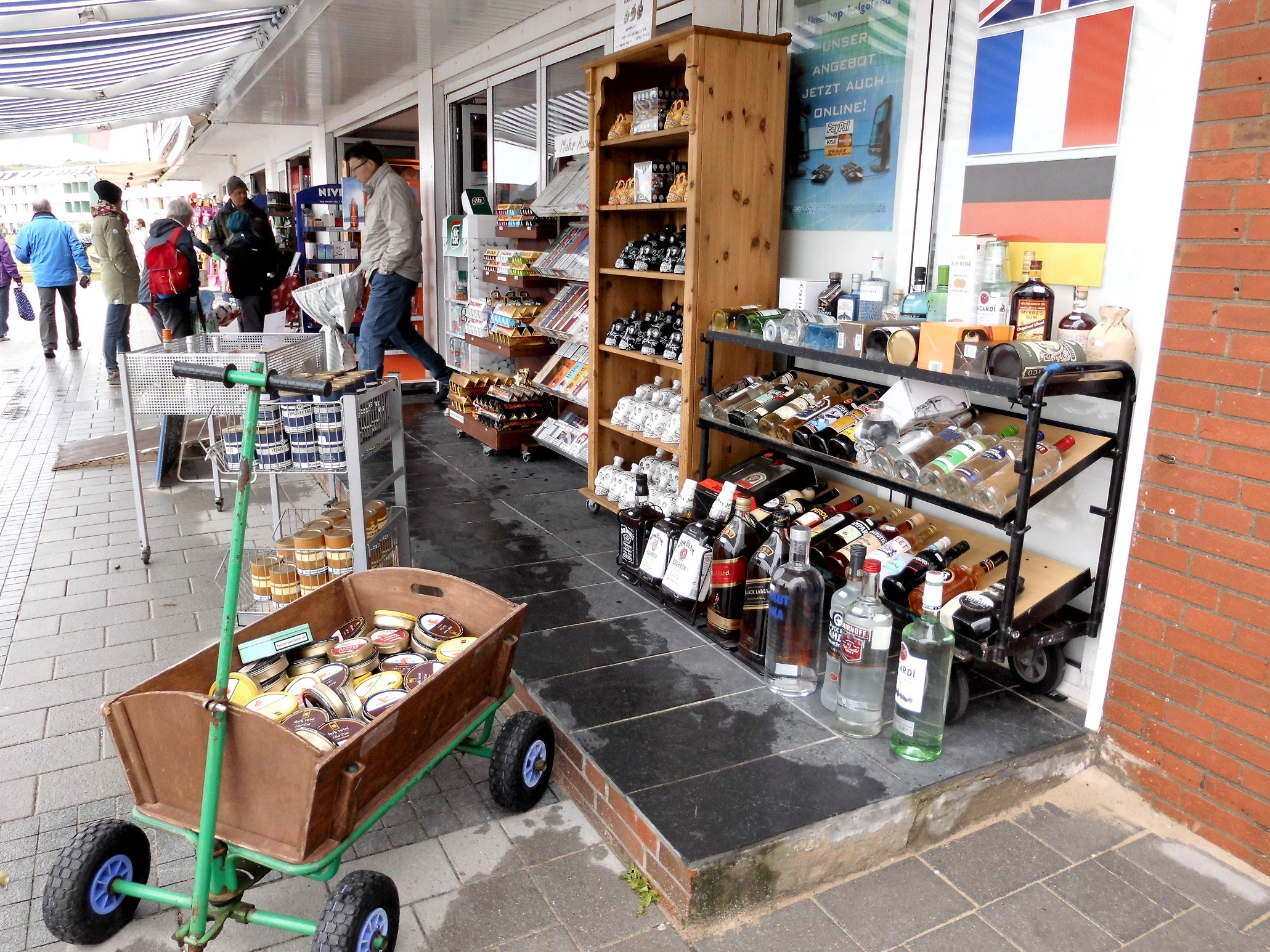 Da auf der Insel Helgoland der Einkauf von zollfreien Waren möglich ist, gibt es im Unter- und im Oberland zahlreiche Geschäfte wie dieses, die Alkoholika, Zigaretten, Süßwaren, Parfüms oder auch Kleidungsartikel anbieten.